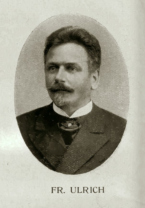 František Ulrich (1859 - 1939), Český advokát, politik, básník a prozaik.